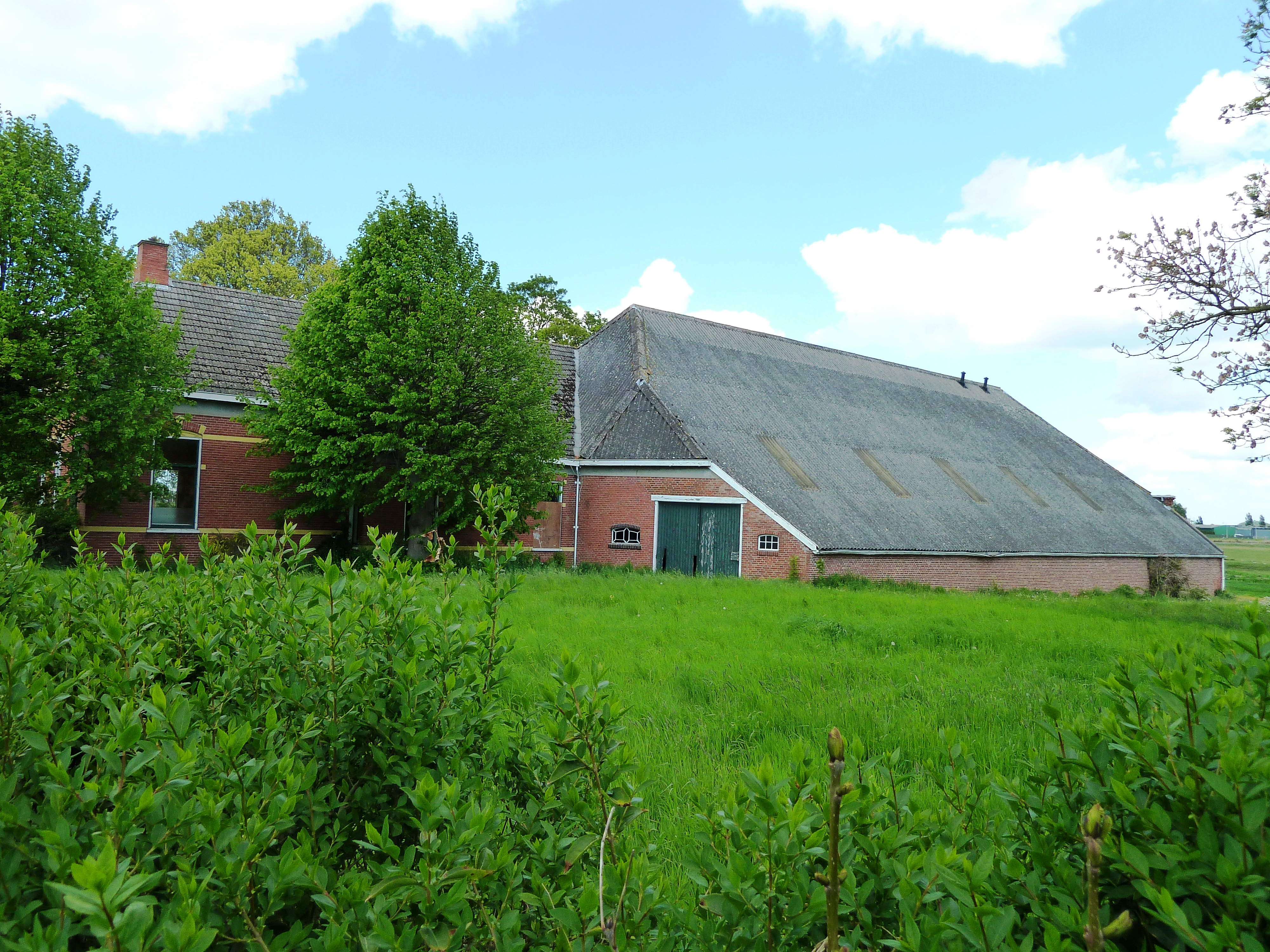 Leegstaande boerderij aan het Kerspelpad in Weiwerd